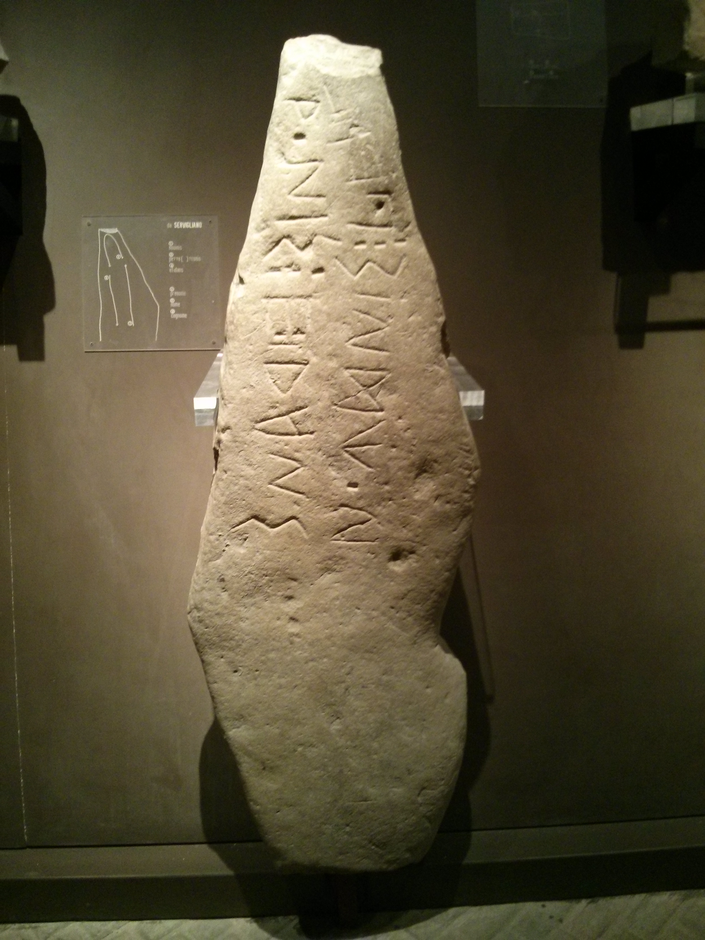 Iscrizioni picene - Stele di Servigliano Museo archeologico nazionale delle Marche Native nameMuseo archeologico nazionale delle MarcheLocationAncona, Marche, ItalyCoordinates43° 37′ 23.39″ N, 13° 30′ 39.38″ E Established1863 Web page control : Q3867709 VIAF: 130879044 ISNI: 0000 0001 2158 0954 LCCN: nr97041772 SUDOC: 027703002 WorldCat institution QS:P195,Q3867709